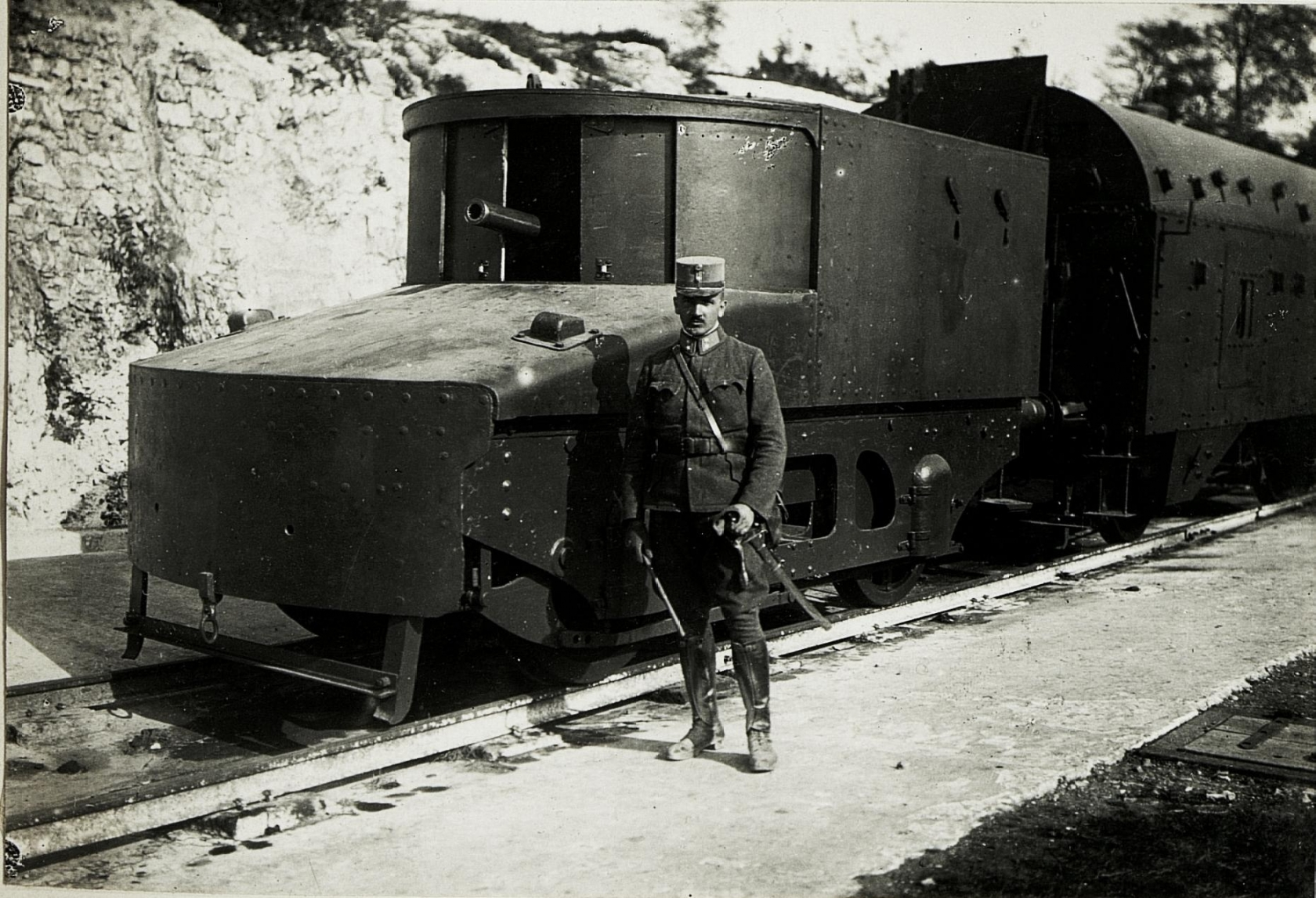 Panzerzug in Nabresina.